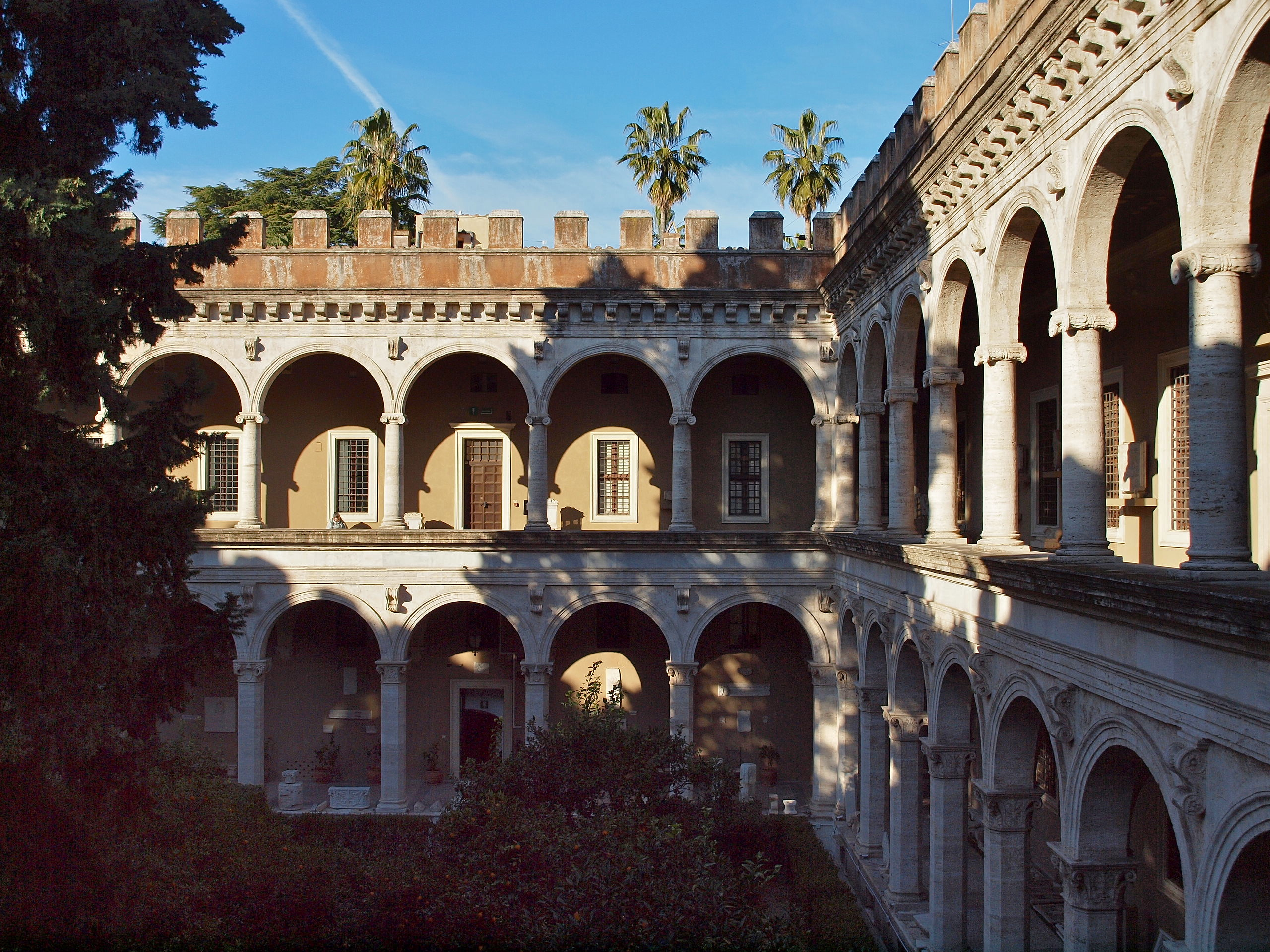 Palazzo di Venezia